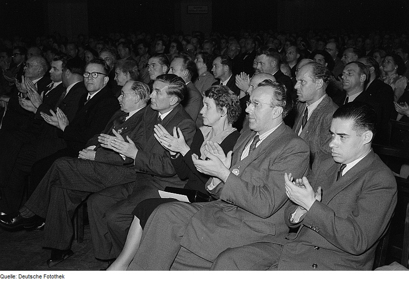 Original image description from the Deutsche Fotothek Publikum der Festivität zum 60jährigen Bestehen der Leipziger Volkszeitung